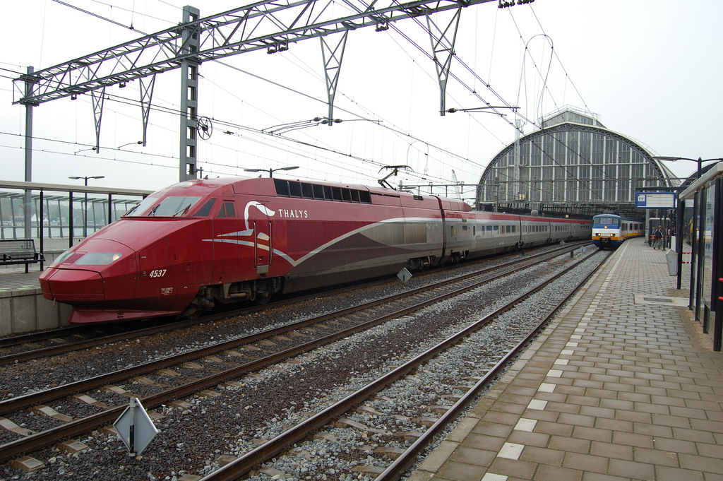 Thalys PBA mit neuem Design im Bahnhof Amsterdam Centraal